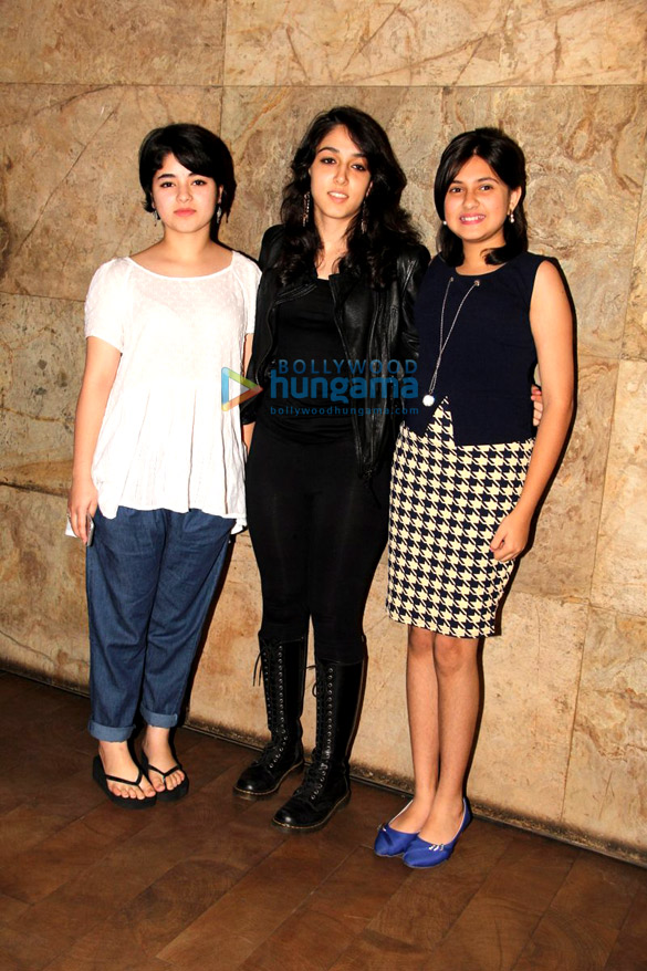 Zaira Wasim, Ira Khan & Suhani Bhatnagar snapped post ‘Dangal’ screening